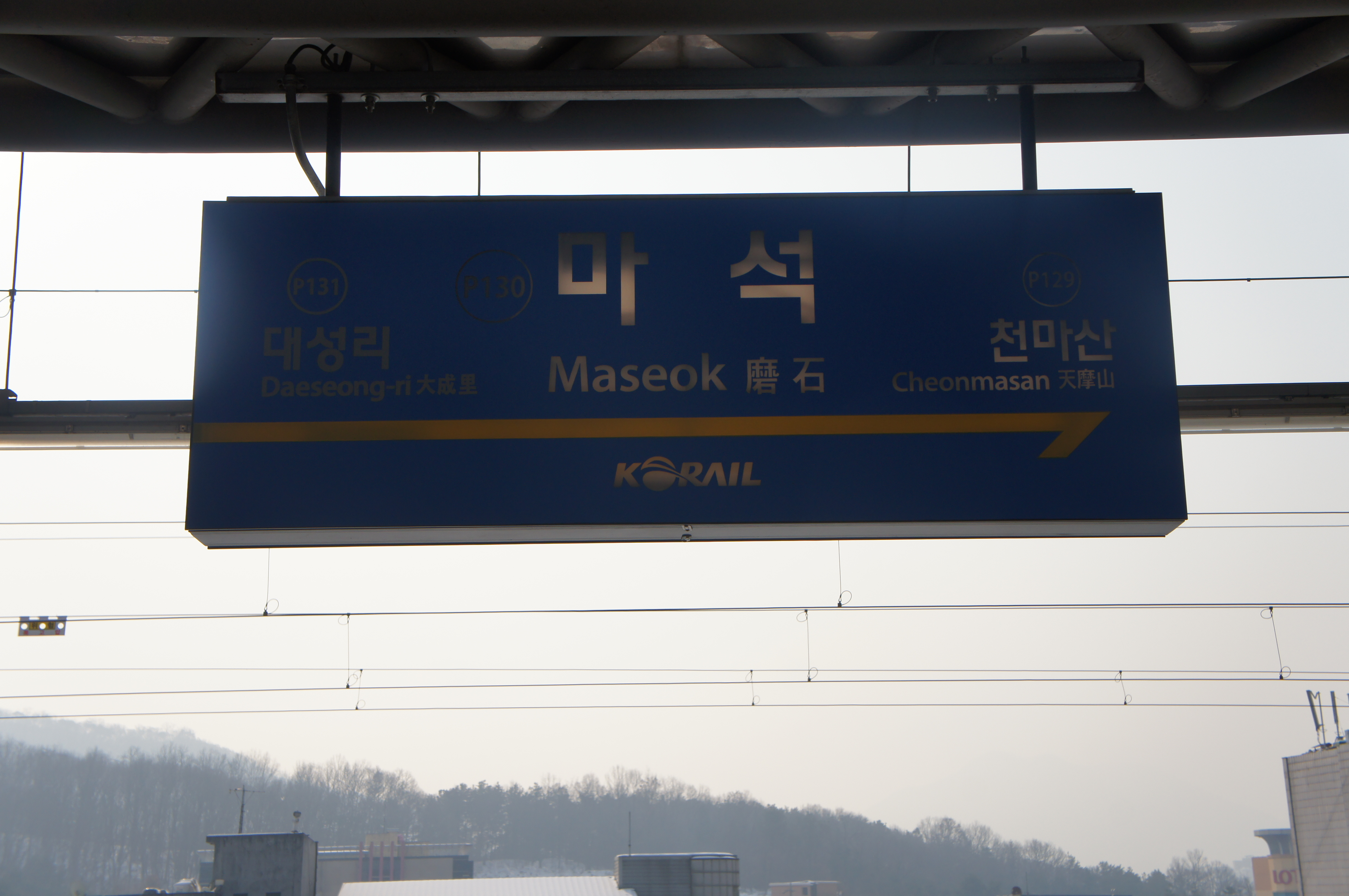 마석역 역명판